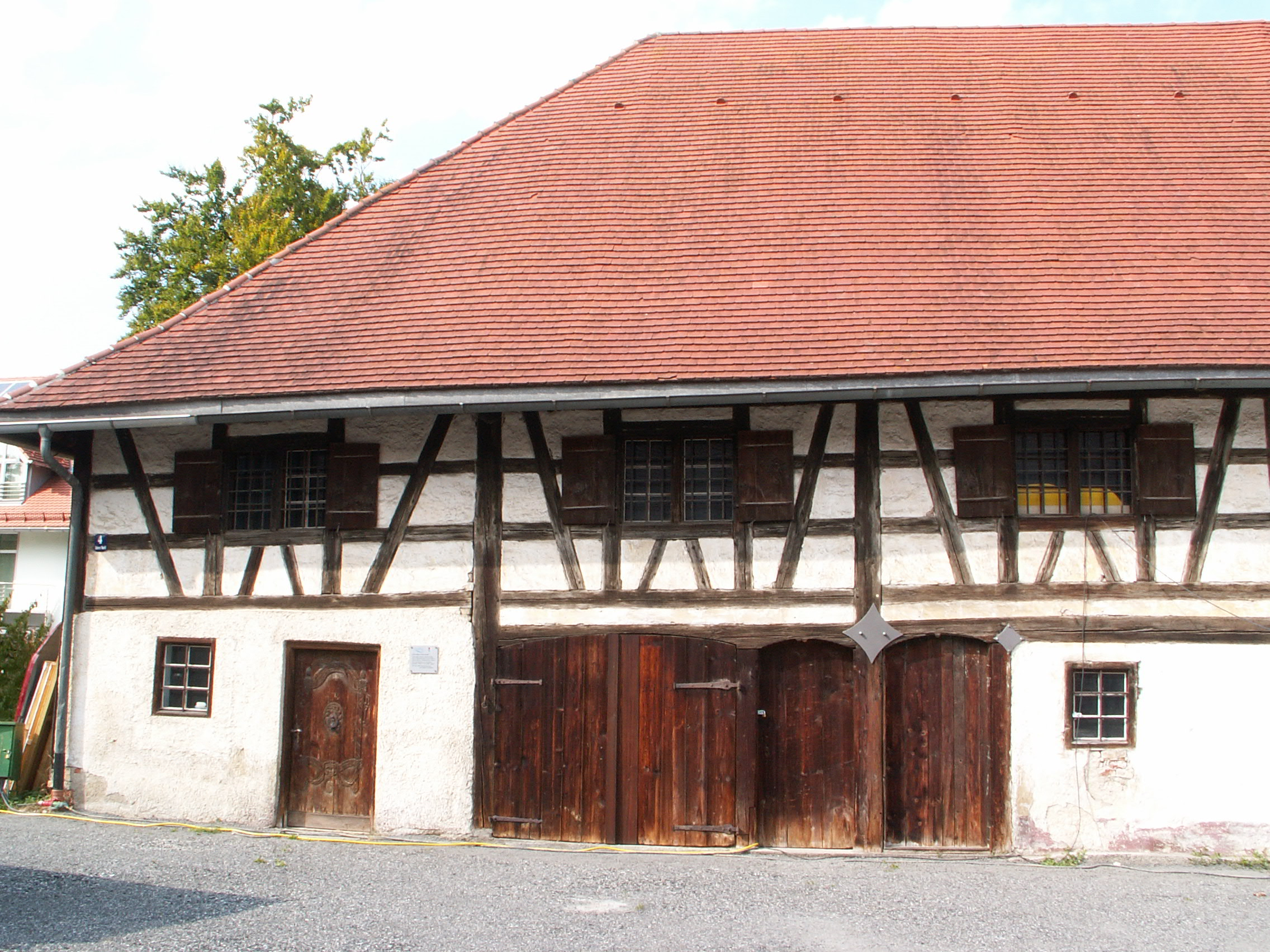 Unterer Markt 4, ehem. Pfarrstadel, Obergünzburg